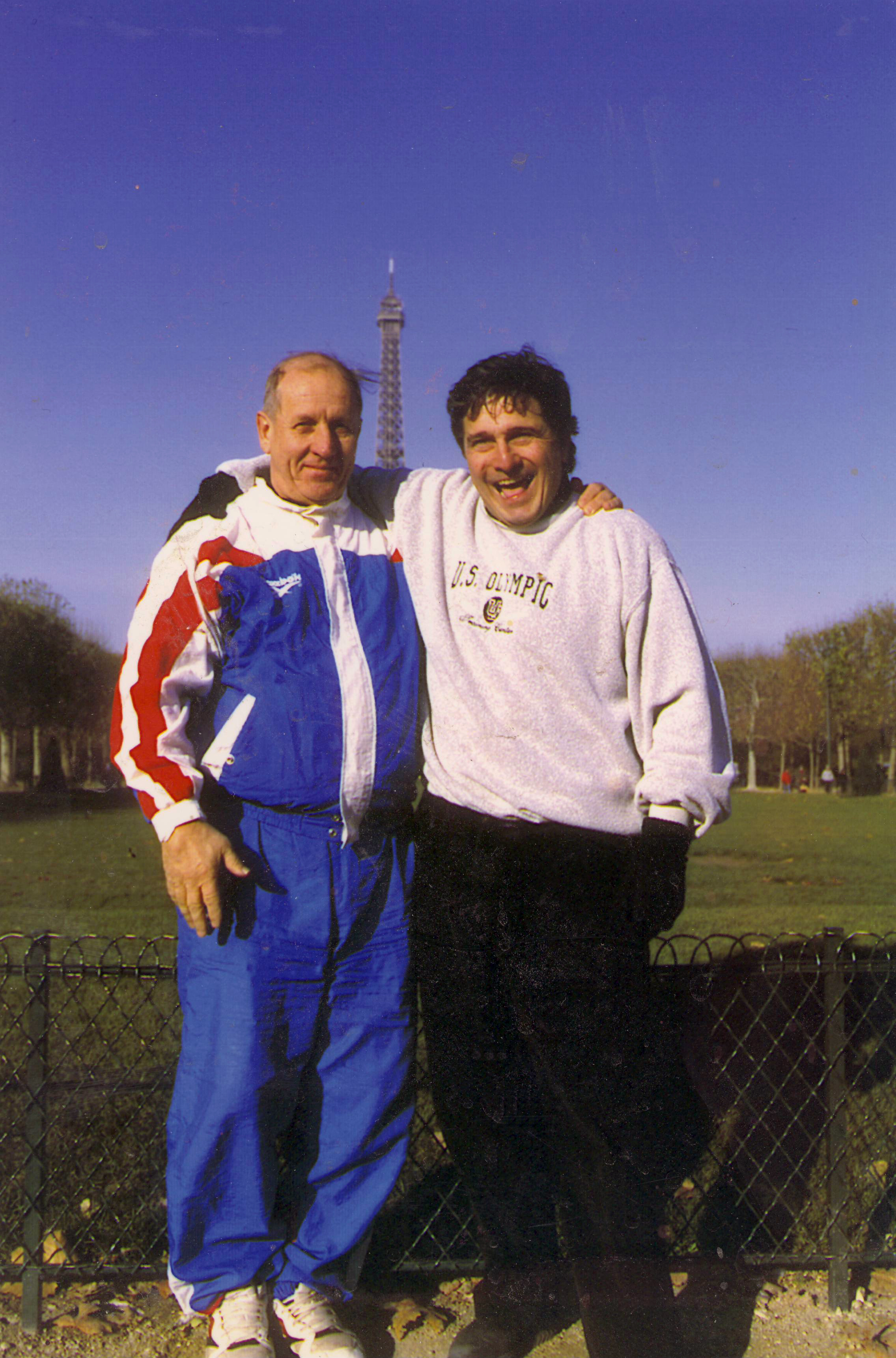 Michel Rouquette, entraîneur de l'équipe de France et Vitaly Doubko, entraîneur de l'équipe d'URSS de trampoline